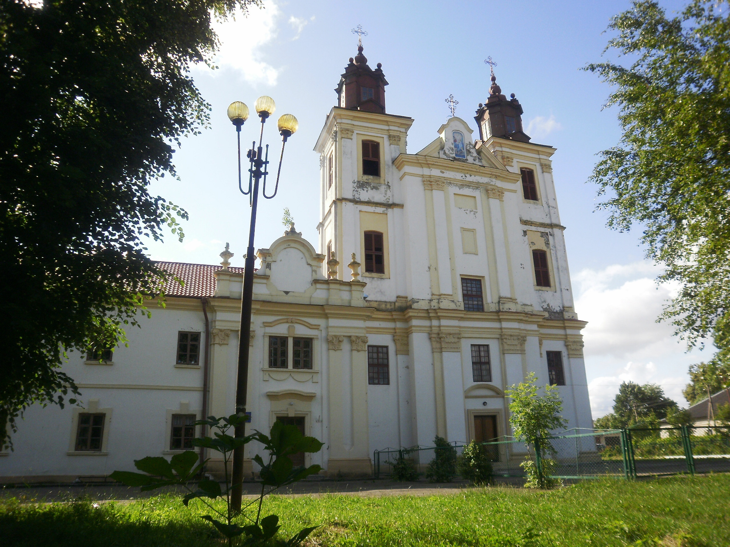 Костел (мур.), Богородчани, вул.Шевченка, 61